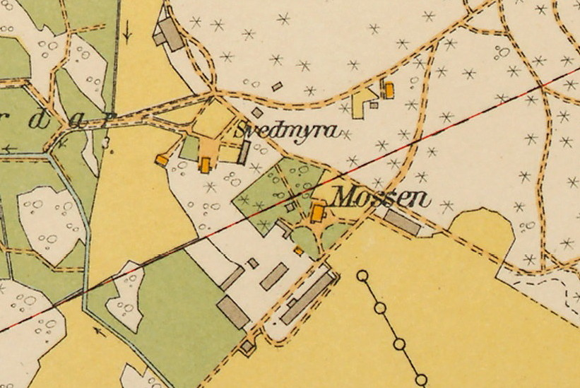 Del av Karta "Enskede" från 1917-1928 visande torpet Svedmyra och Mossens gård